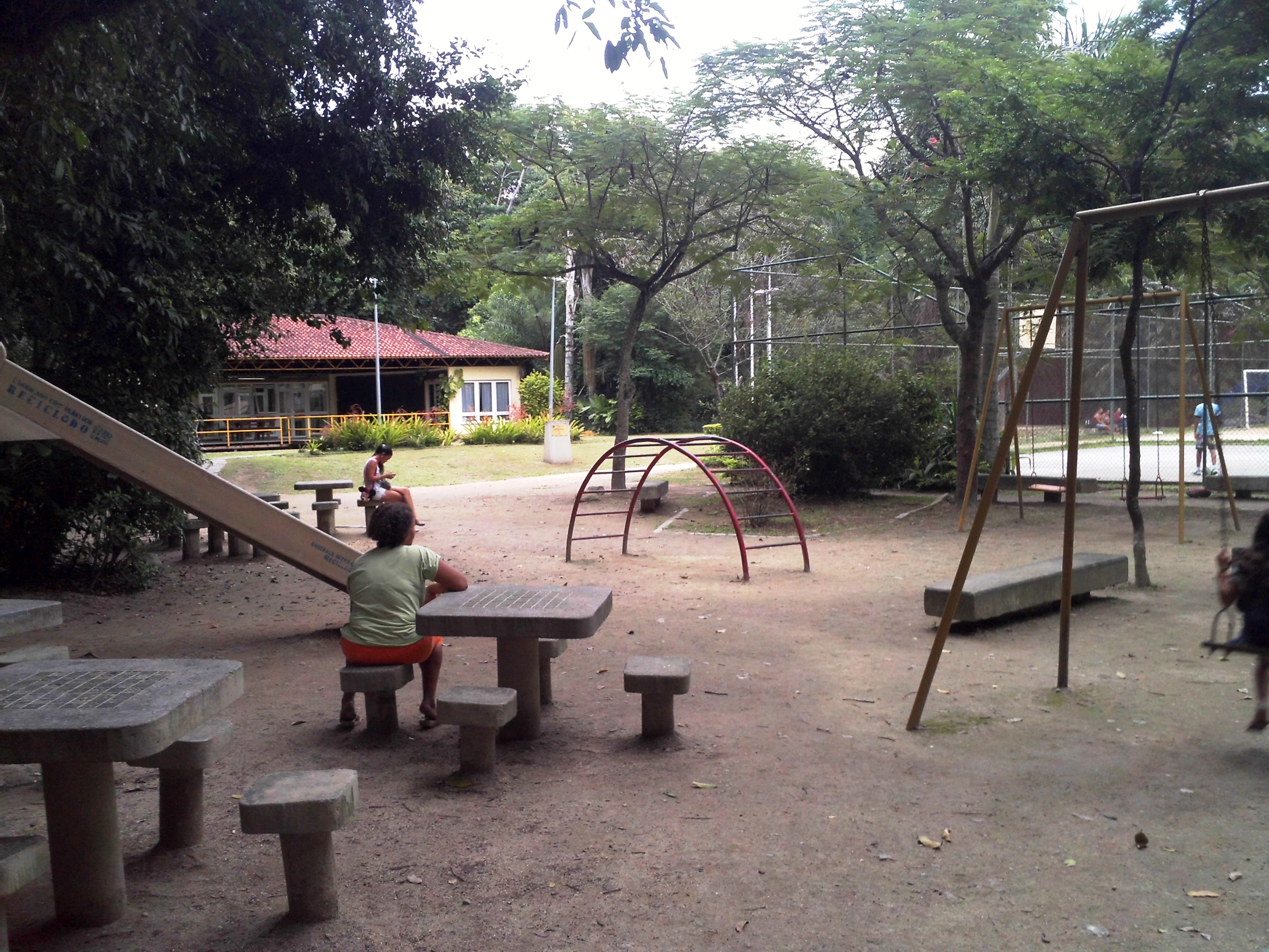 Bosque da Freguesia - Rio de Janeiro.